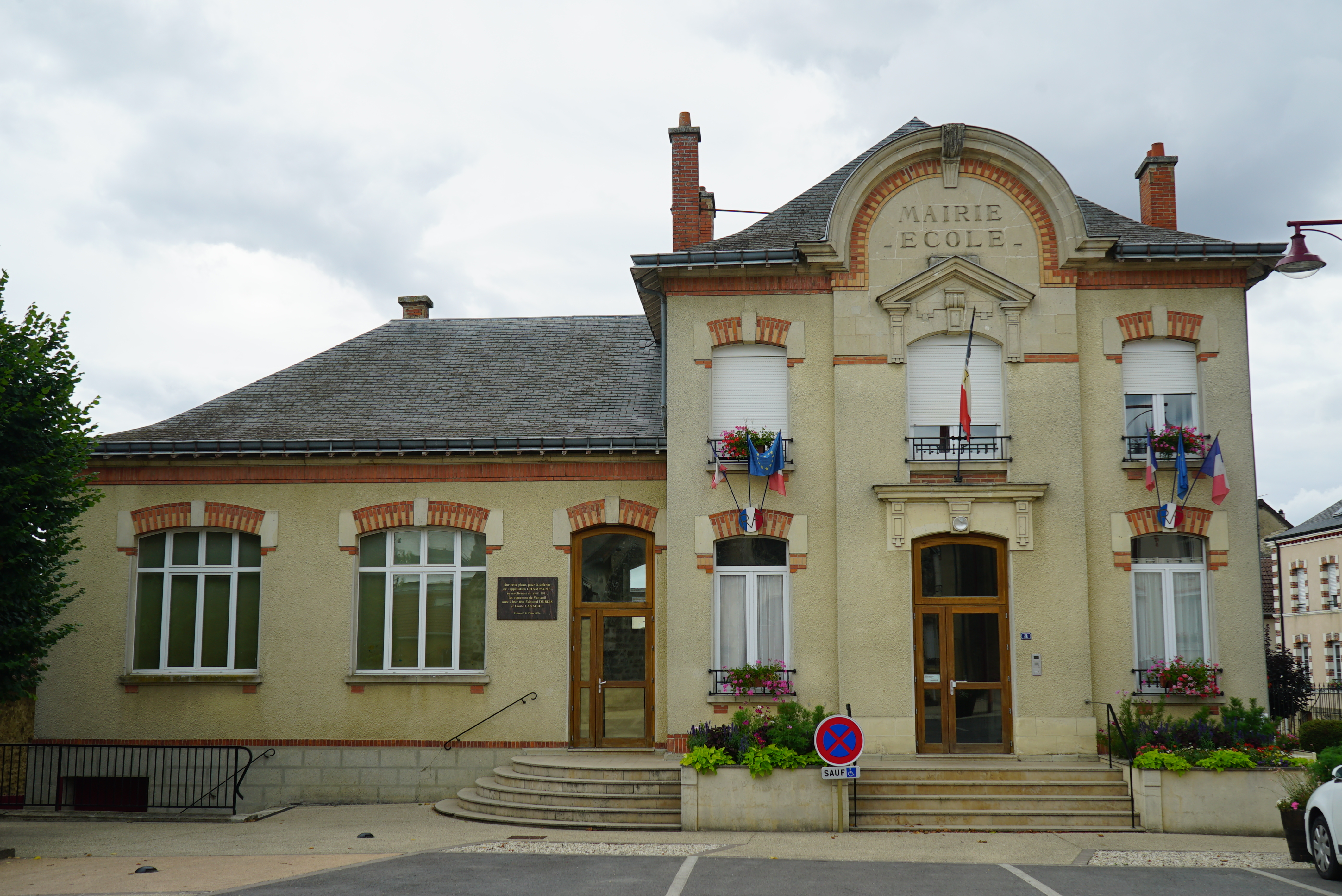 du village de Venteuil.